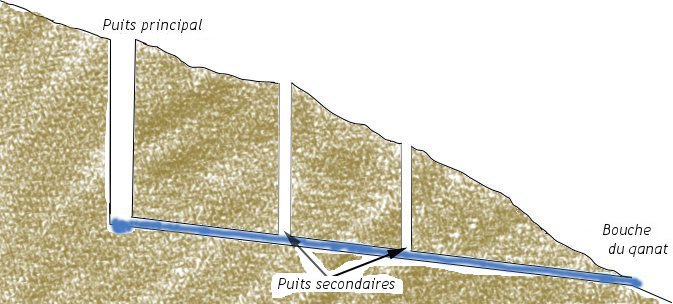 Qanat scheme